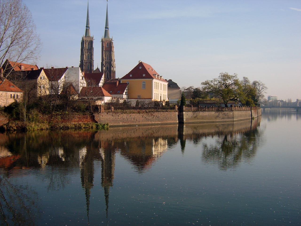 Wrocław widok na Ostrów Tumski z promenady spacerowej